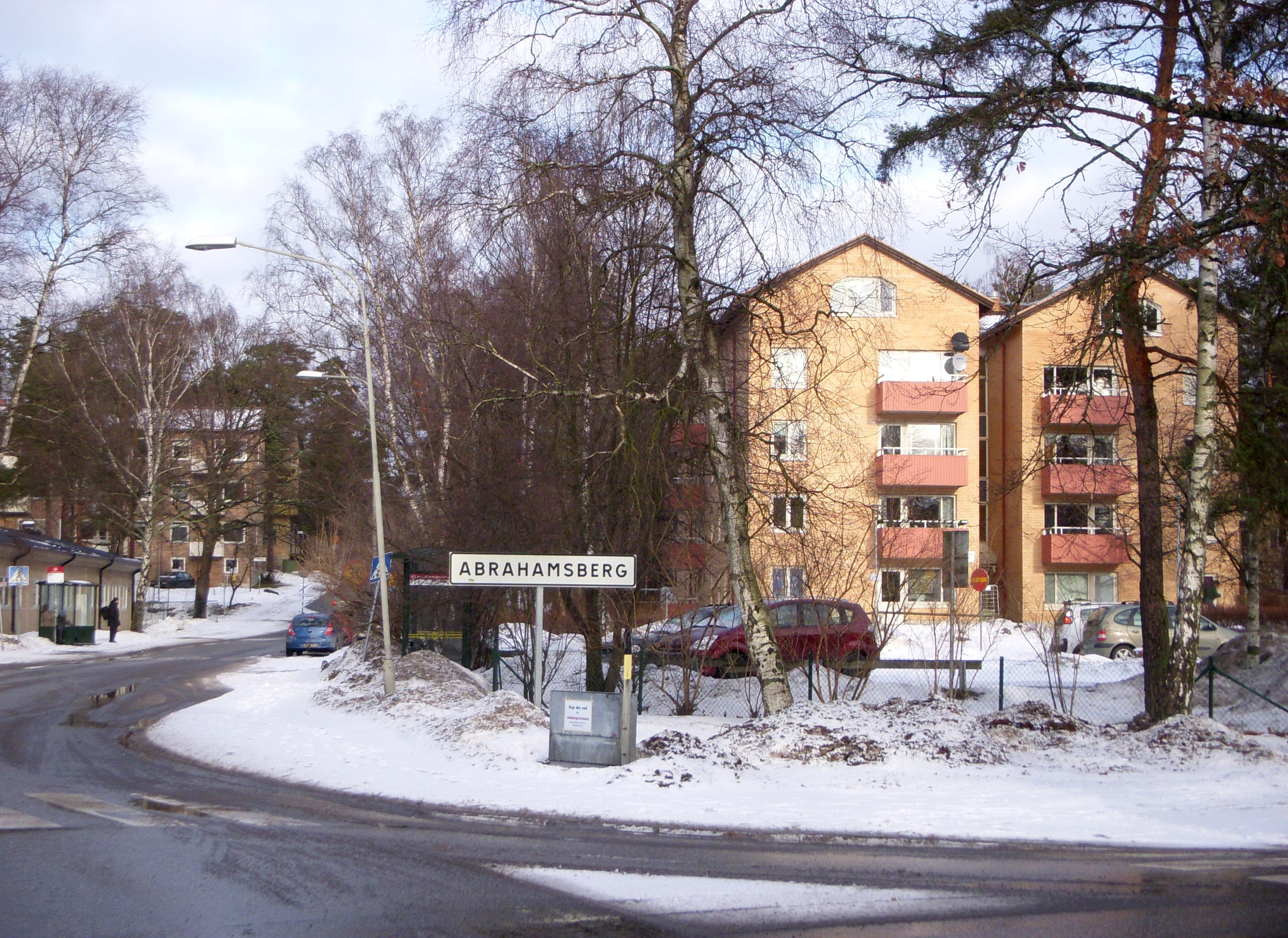 Abrahamsberg, Bromma, Stockholm